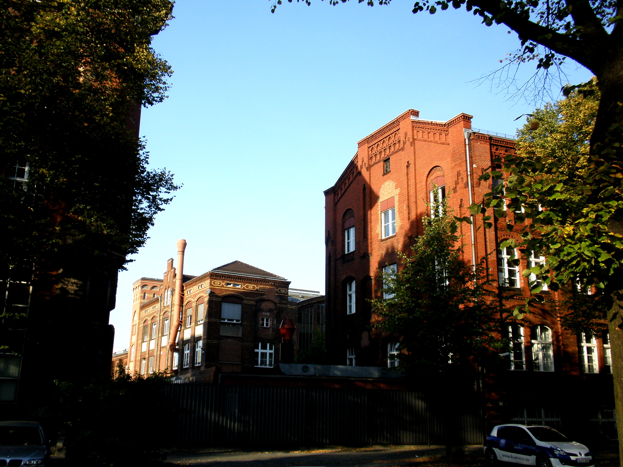 Turbine Hall of Union-Elektricitäts-Gesellschaft, later AEG-Turbinenfabrik